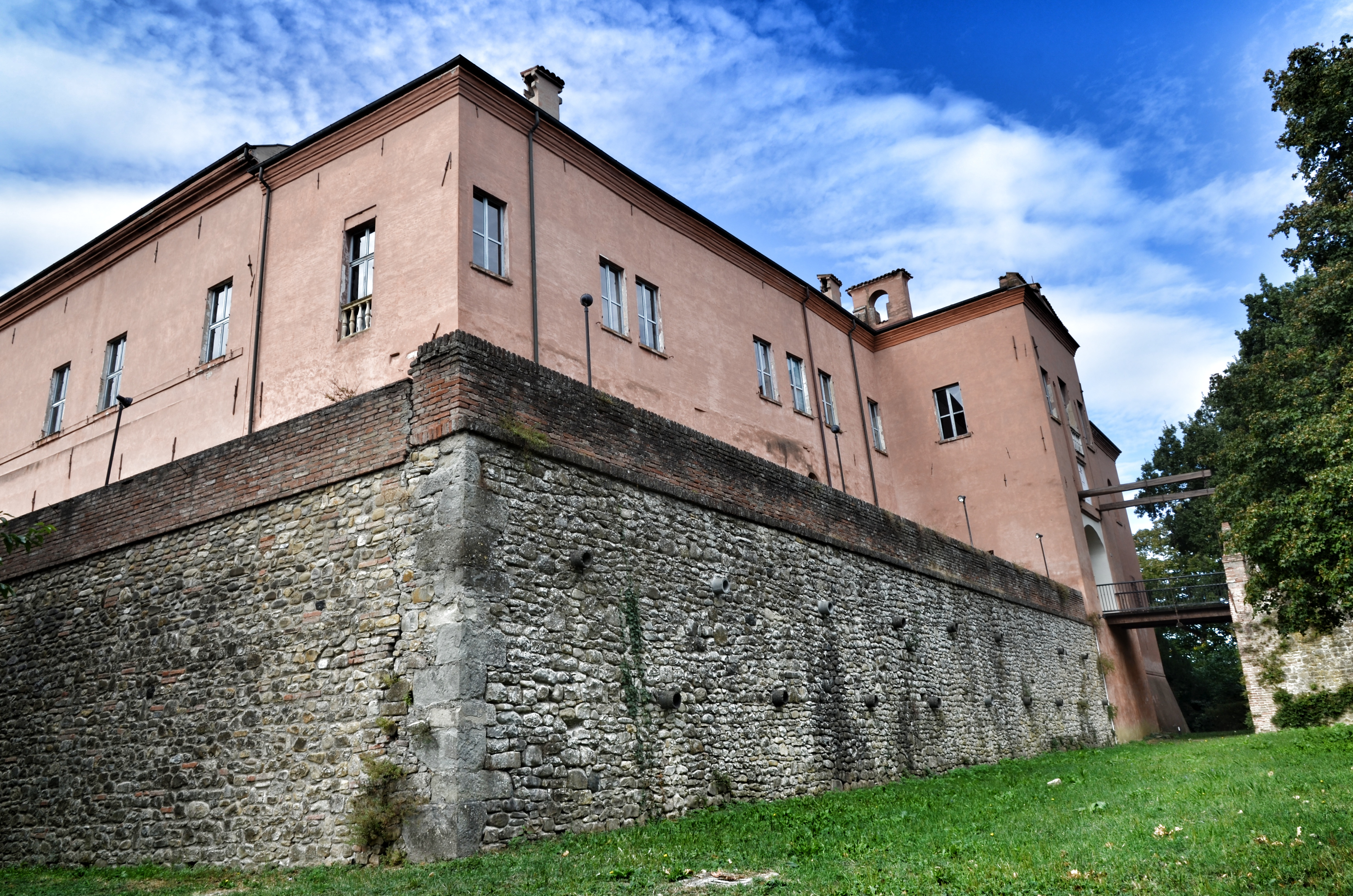 Castello di Spezzano This is a photo of a monument which is part of cultural heritage of Italy.